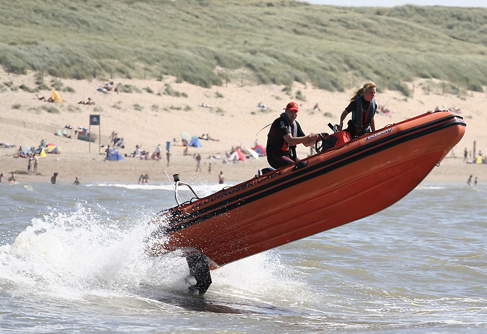 Een SR-8 van de KRB.